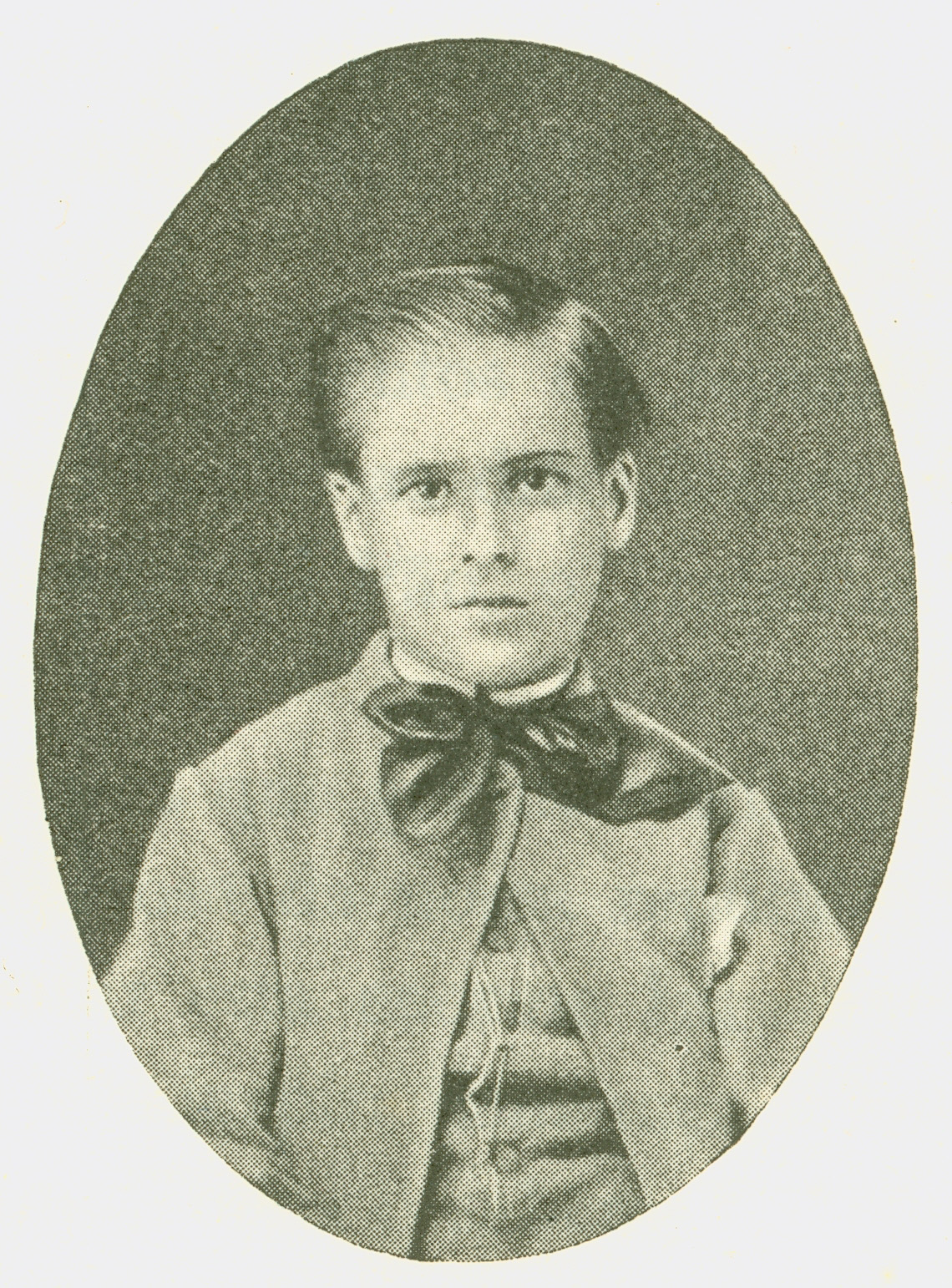 Henrique de Paiva Couceiro - 11 ans